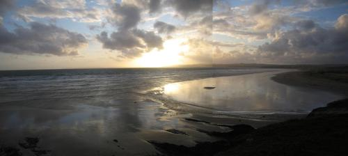 FiLiPoOo